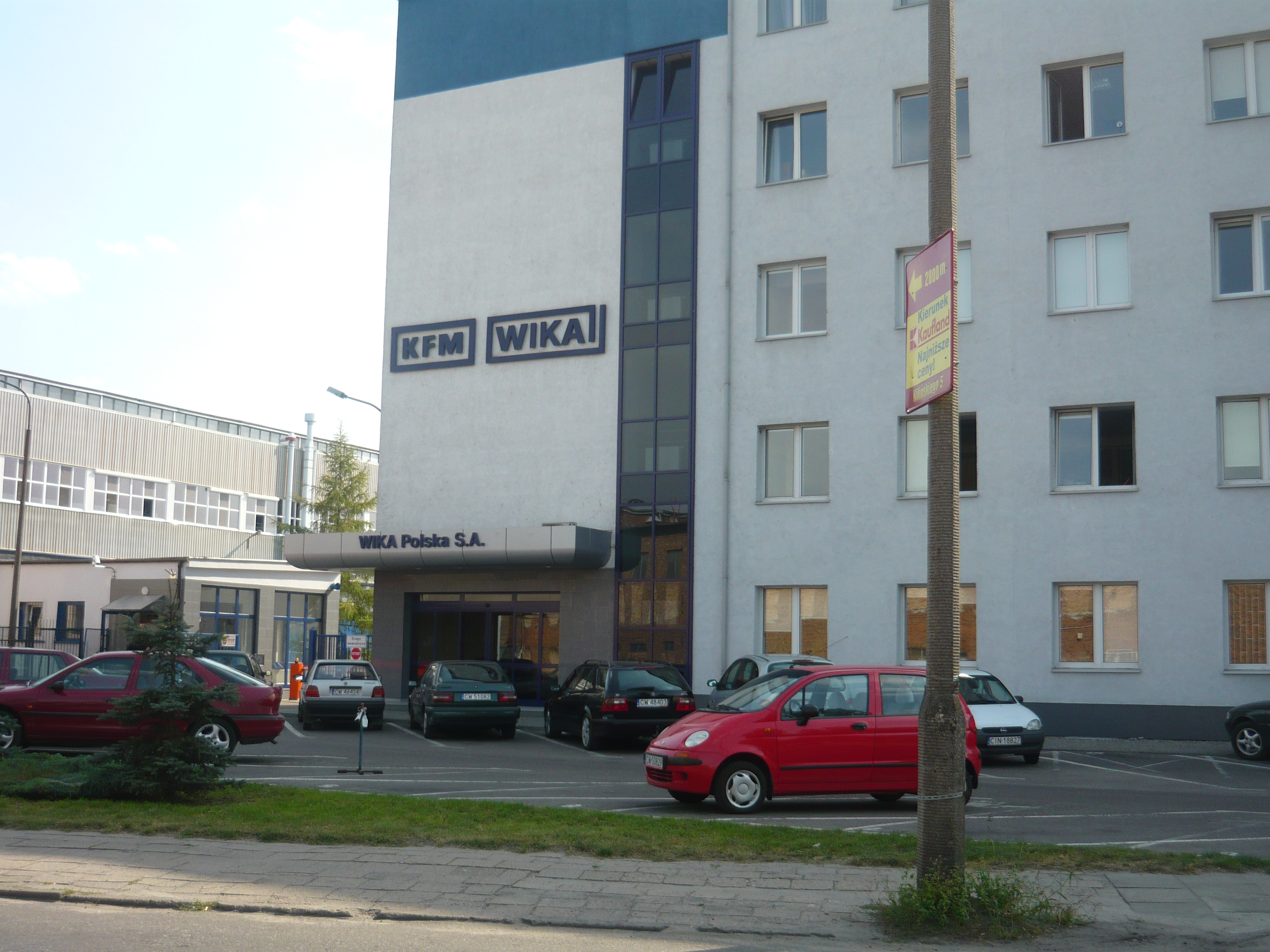 Wejście do WIKA Polska S.A., dawniej Kujawskiej Fabryki Manometrów